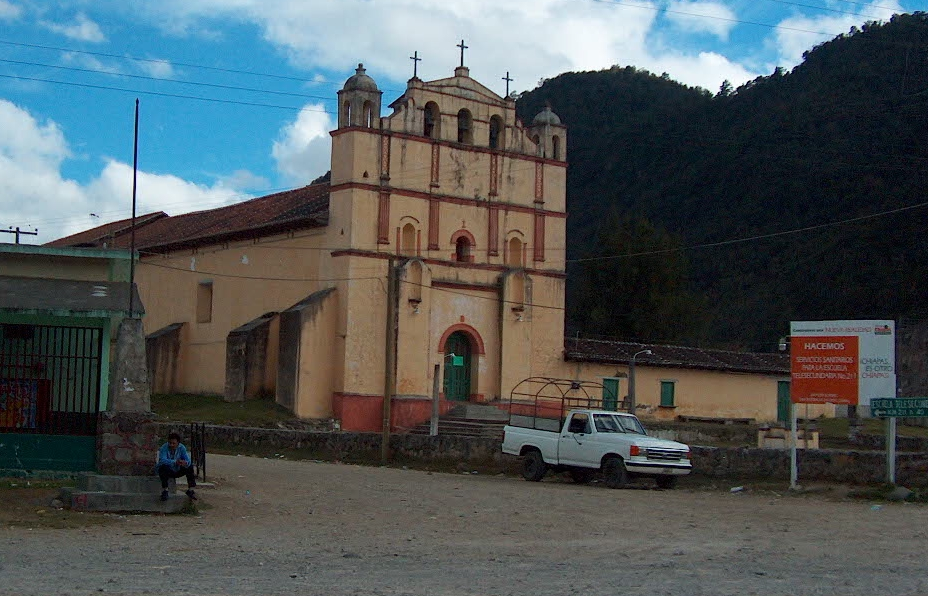 Antigua iglesia de San Felipe en las afueras de la ciudad de San Cristóbl de Las Casas.